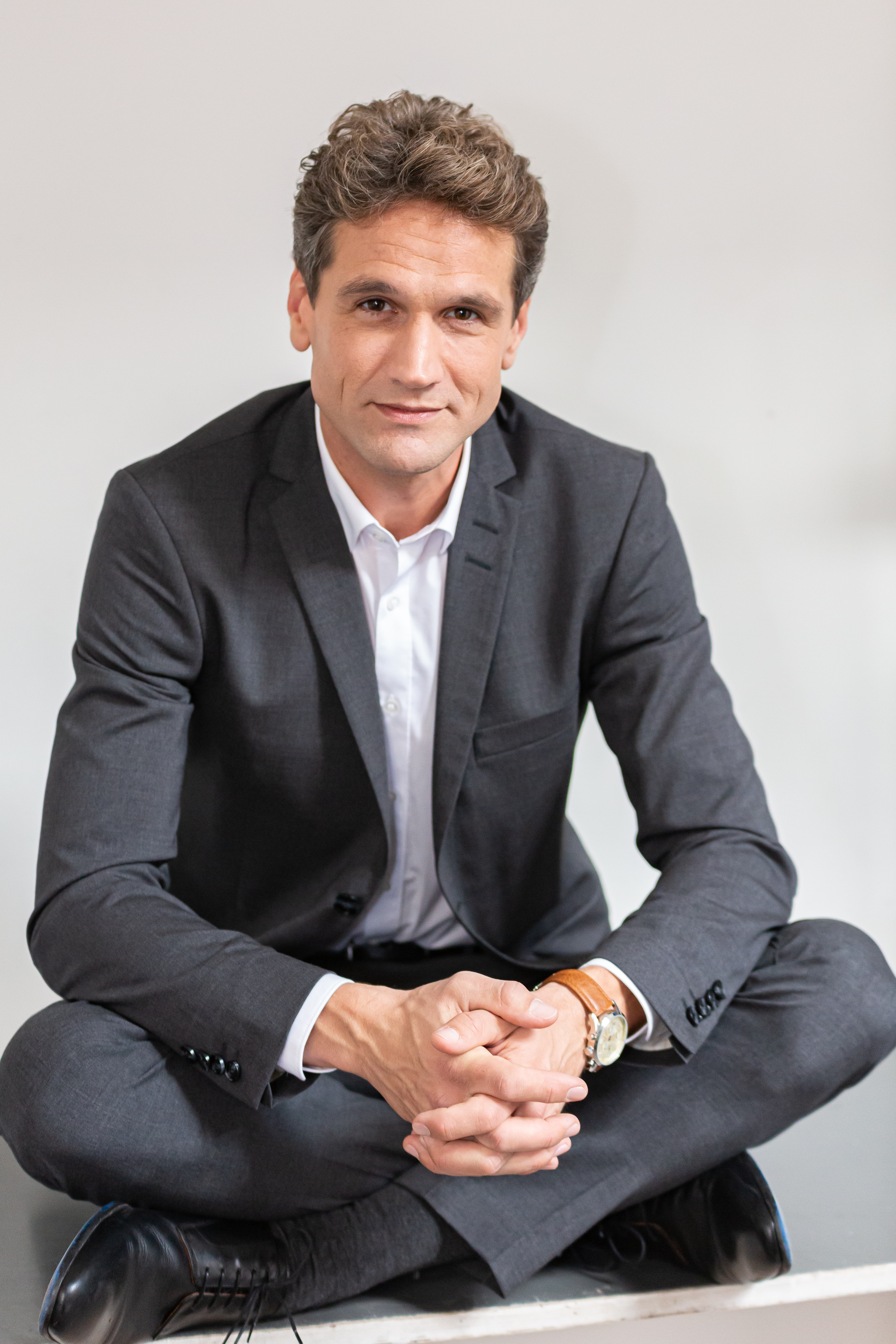 TV, ARD, Cast "Rote Rosen" Staffel 16; Oliver Franck